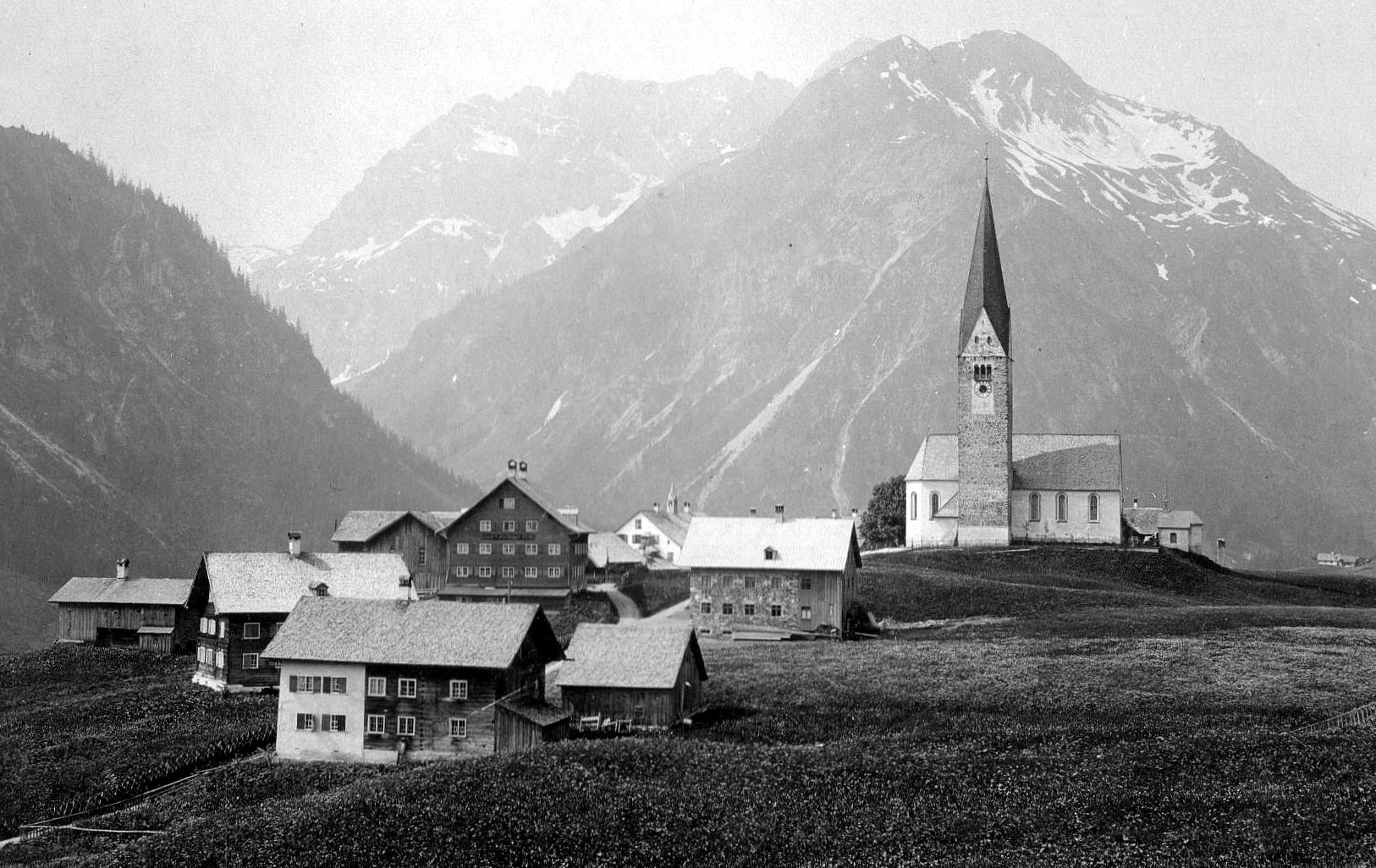 Mittelberg im Kleinwalsertal, aufgenommen etwa um 1900